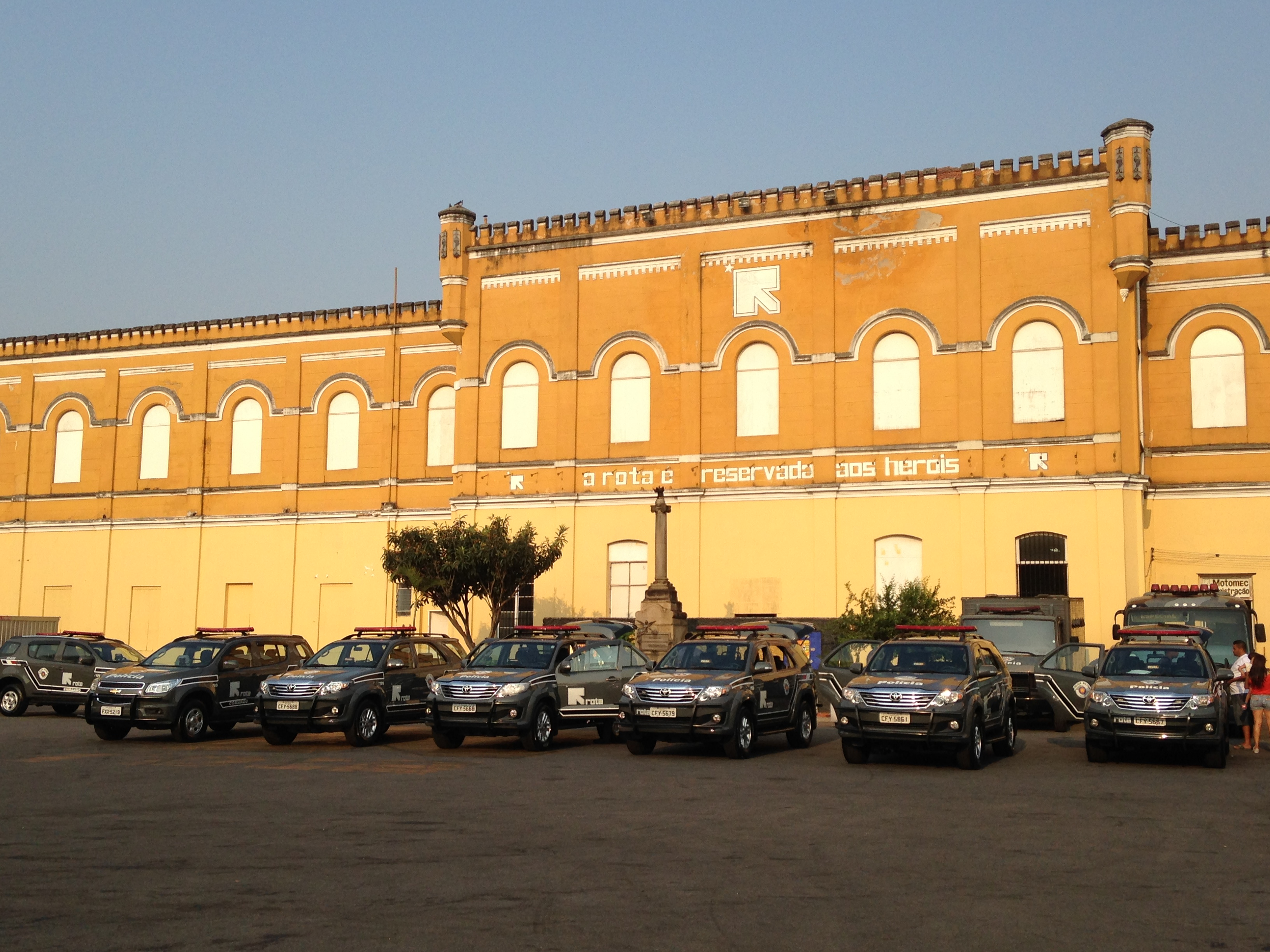 "A Rota é reservada aos heróis." (Av. Tiradentes, 440 - Luz, São Paulo)